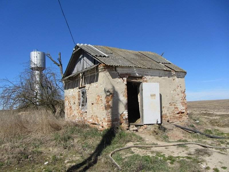 Рап’ёва. Сядзіба Мікульскіх